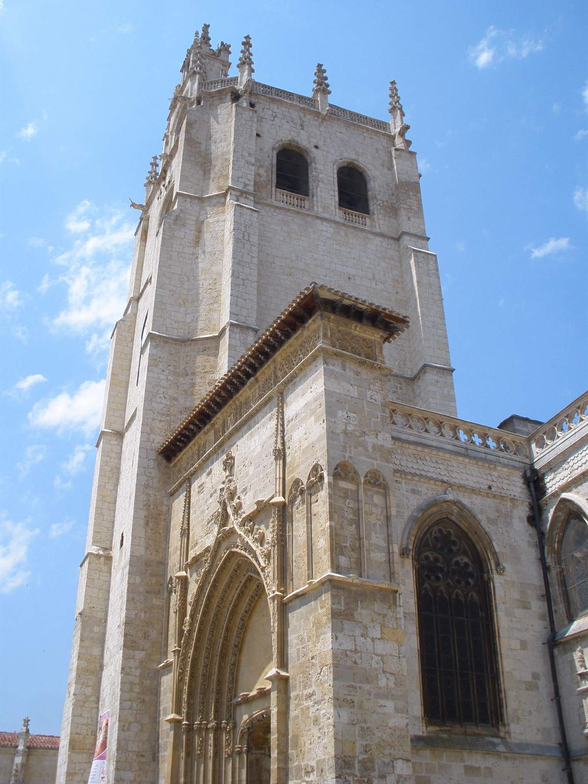 Palencia - Catedral